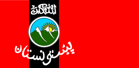 Flag of Pakhtunistan